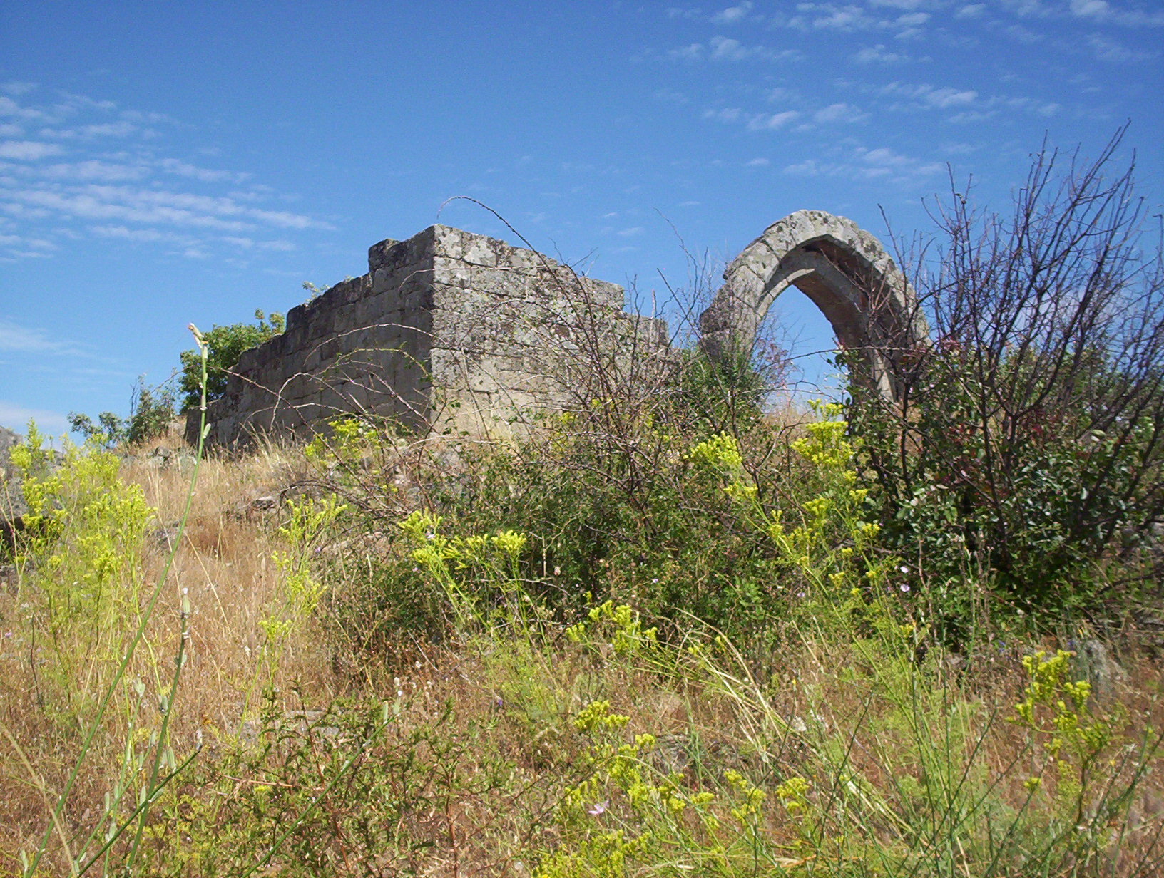 Ruínas da antiga Santa Maria de Porto de Vide ou Bogalhal Velho, Pinhel